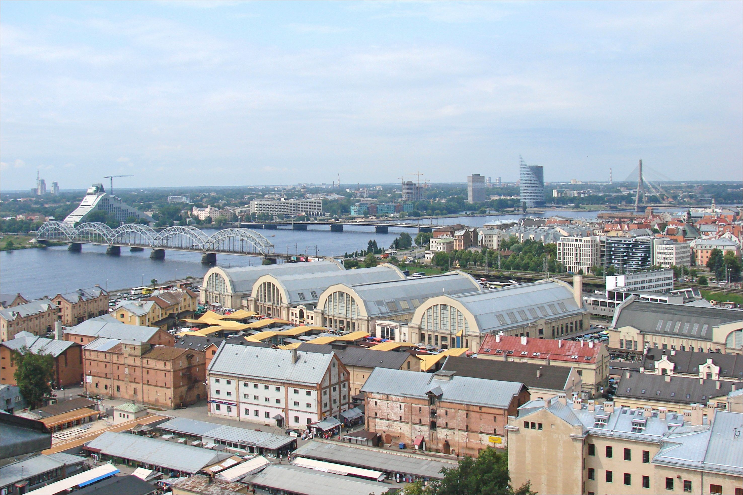 Les halles utilisées par le marché central sont d'anciens hangars à zeppelins, elles sont proches du fleuve Daugava que l'on voit sur la photo prise depuis la terrasse de l'immeuble de l'Académie des sciences. De nombreux commercants sont également en dehors des halles. Article de Wikipedia sur Riga Voir l'album sur le marché de Riga